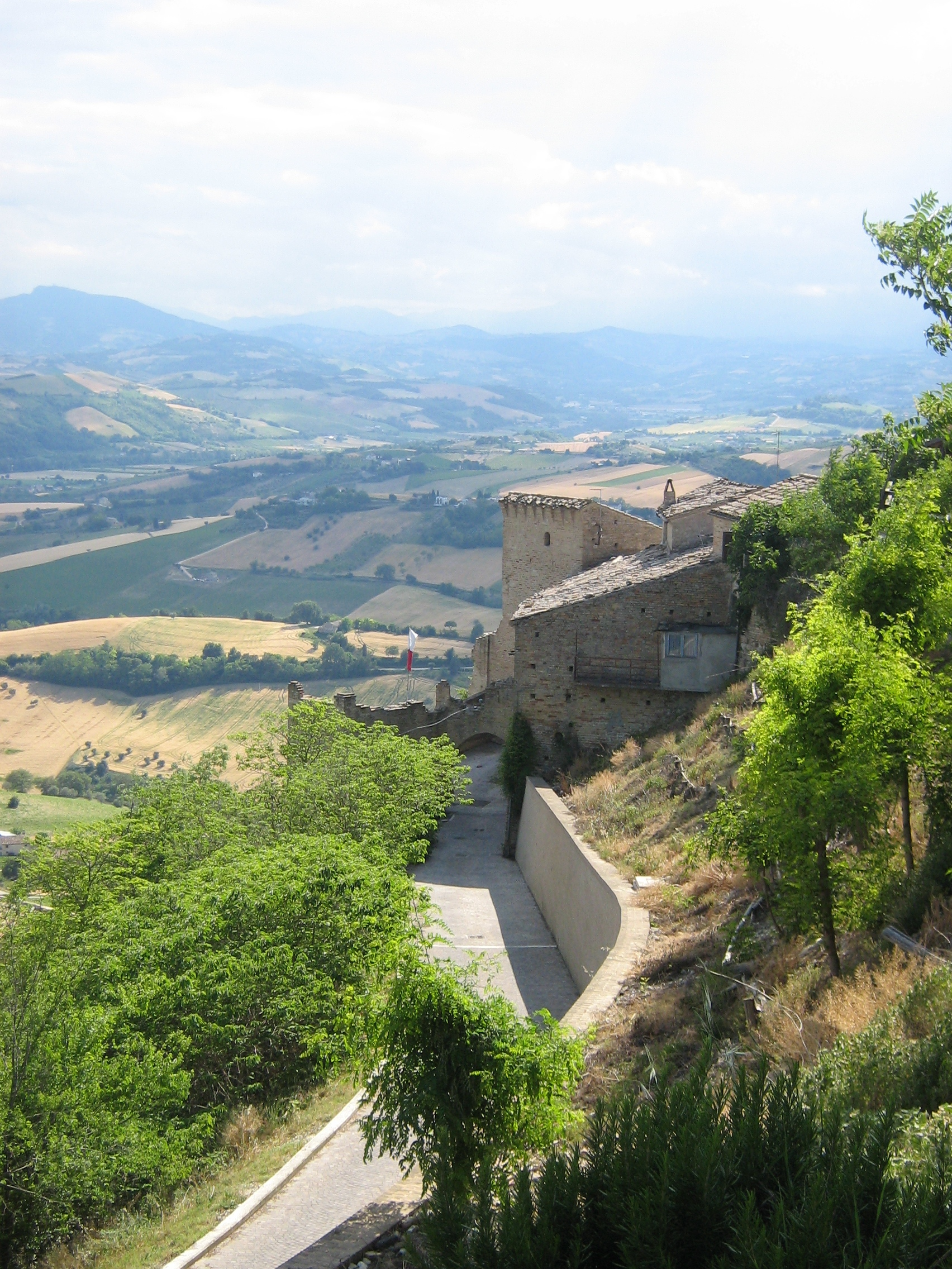 Autore: Paola Cartacci Data: Giugno 2007 Descrizione: Immagine di Porta San Basso